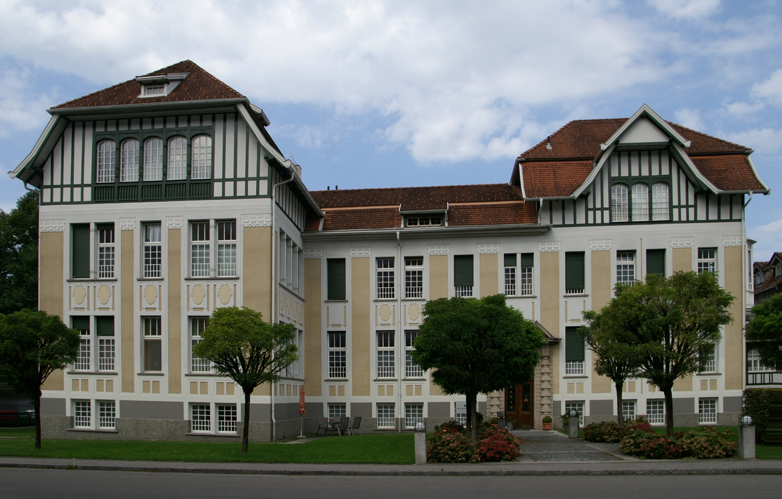 altes Krankenhaus, Kaiserin-Elisabeth-Str. 4-6 in Hohenems Architekt: Hanns Kornberger, Baujahr 1904 + 1905